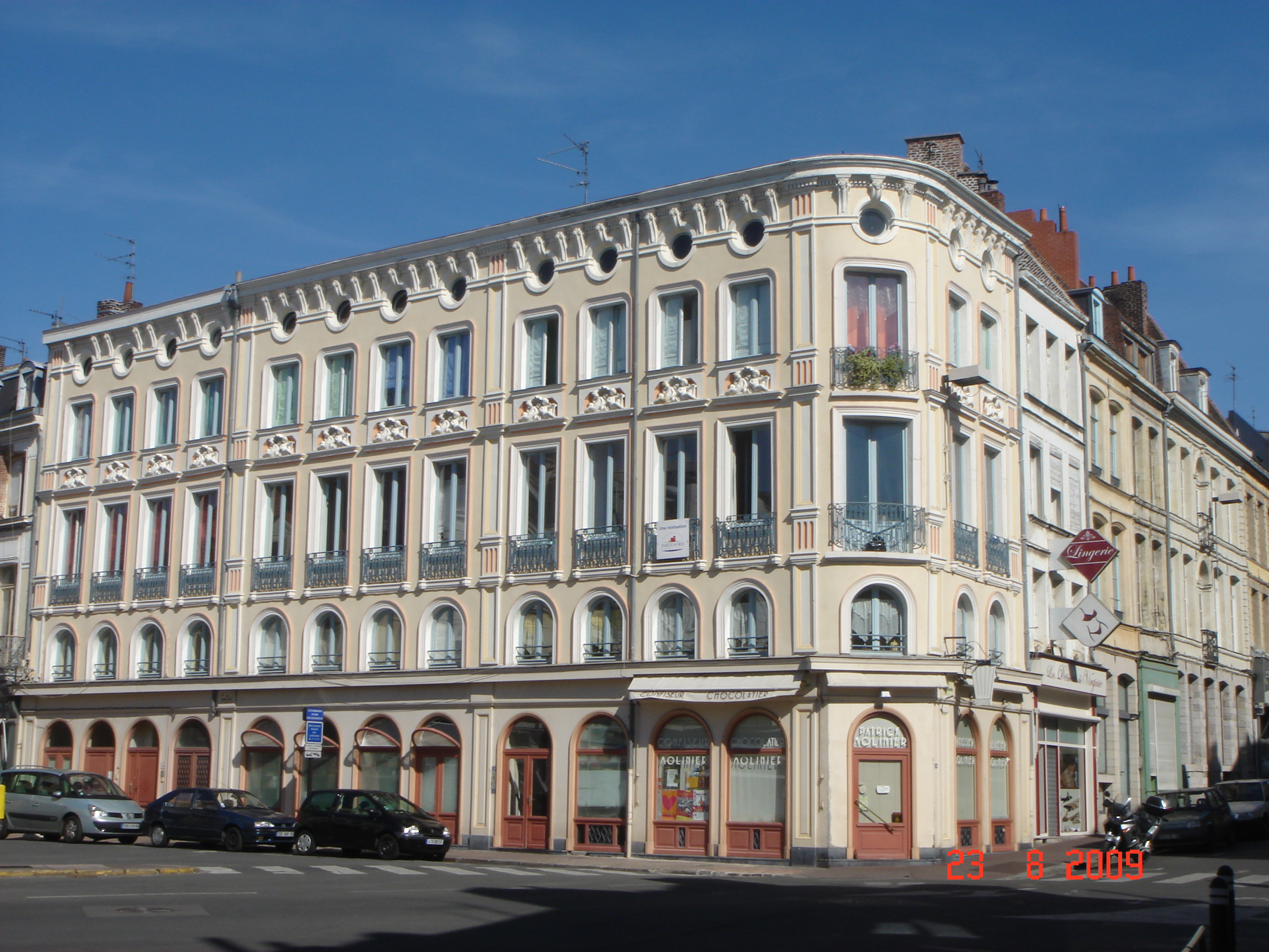 Douai angle rue de la Boucherie et Rue de la Mairie